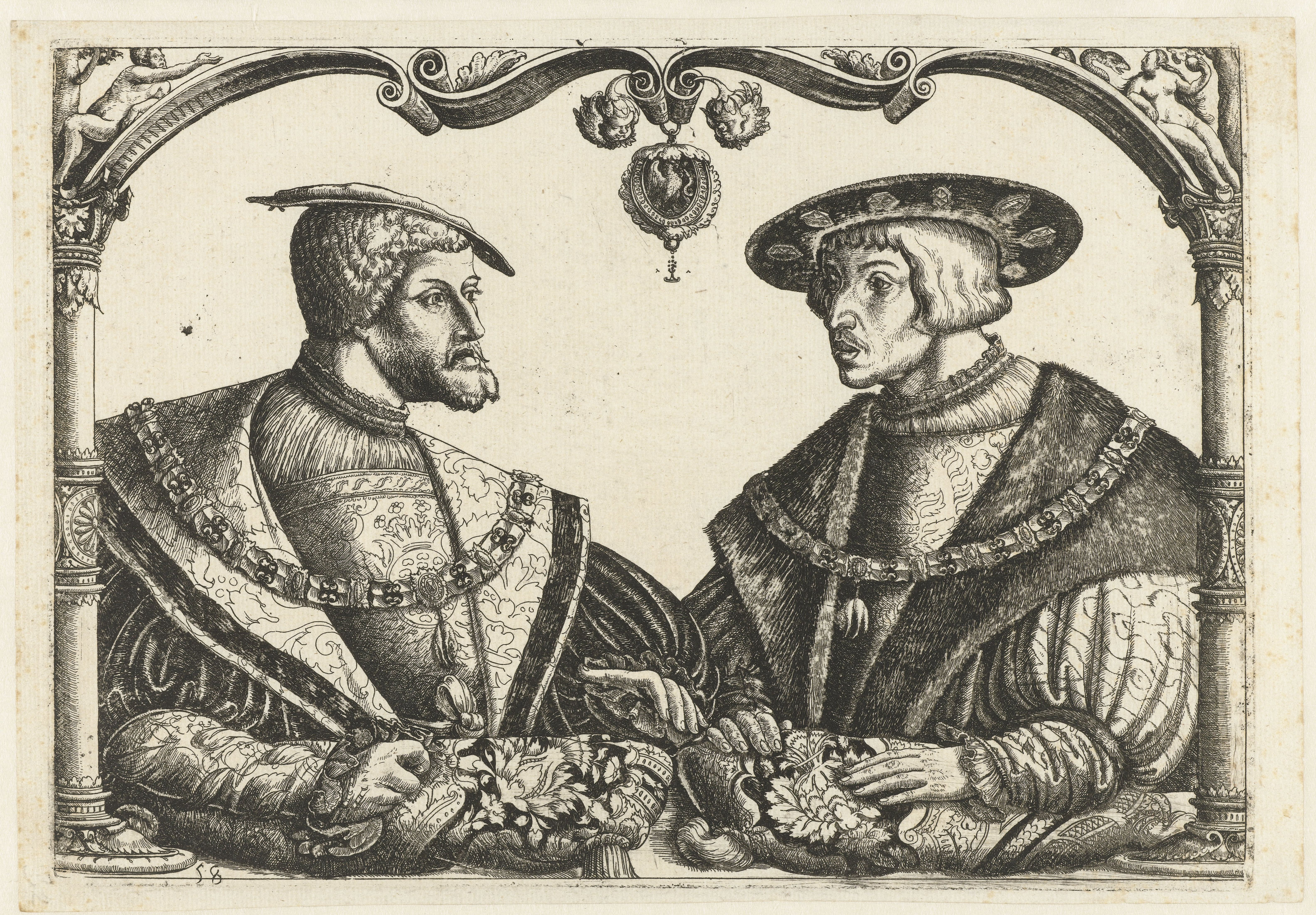 IdentificatieTitel(s): Karel V en Ferdinand IObjecttype: prent Objectnummer: RP-P-OB-3116Catalogusreferentie: Hollstein German 5-2(2)The Illustrated Bartsch 3Opschriften / Merken: nummer, recto linksonder, etsen: ‘58’verzamelaarsmerk, verso linksonder, gestempeld: Lugt 240Omschrijving: Portret van Karel V en zijn broer Ferdinand I binnen een architectonische omlijsting. In het midden hangt een medaillon met rechts en links daarvan de letter L (?) A, mogelijk een monogram van een prentmaker.VervaardigingVervaardiger: prentmaker: Monogrammist CB met boom (toegeschreven aan)Plaats vervaardiging: DuitslandDatering: 1513 - 1553Fysieke kenmerken: etsMateriaal: papier Techniek: etsenAfmetingen: plaatrand: h 196 mm × b 278 mmOnderwerpWie: Karel V van Habsburg (Duits keizer en koning van Spanje)Ferdinand I van Habsburg (Duits keizer)Verwerving en rechtenVerwerving: overdracht van beheer 1816Copyright: Publiek domein